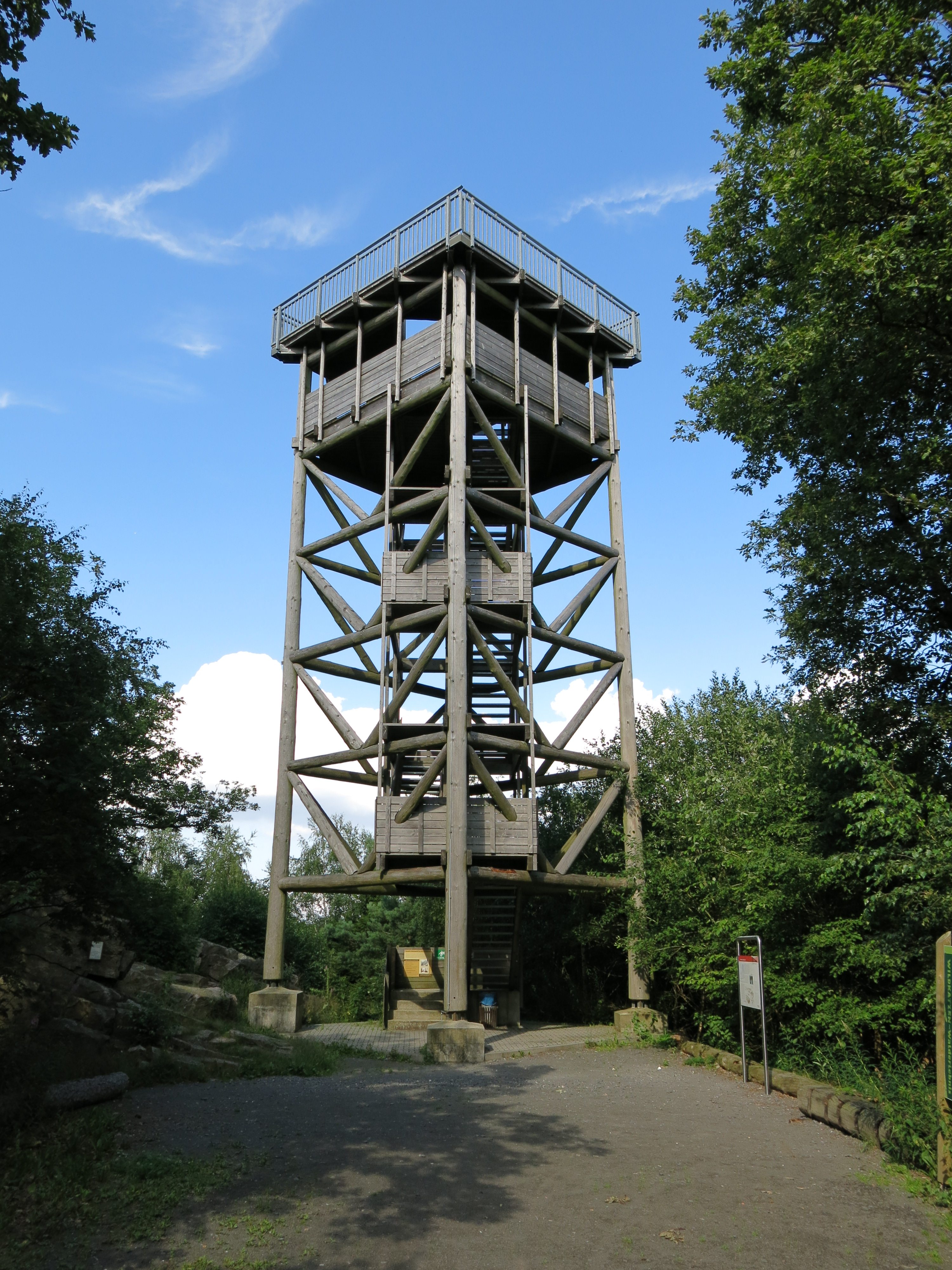 Der Wintersteinturm im Taunus bei Ober Mörlen